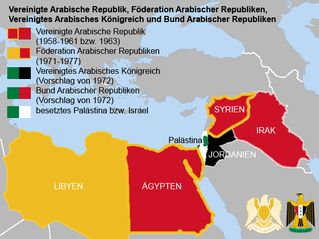 Der im März 1972 von Irak vorgeschlagene Bund Arabischer Republiken (in der Karte grün, rot und weiß) war ein unmittelbarer Gegenvorschlag zu Jordaniens Plan eines Vereinigten Arabischen Königreiches (in der Karte grün und schwarz), kollidierte jedoch mit der schon existierenden Föderation Arabischer Republiken (in der Karte gelb und gelb umrandet). Die Einbeziehung Palästinas (in der Karte grün und weiß) in den Vorschlag ist erwähnt bei Hassan Tawalba: The Ba'th and Palestine, S. 55f. Dar al-Ma'mun, Bagdad 1982